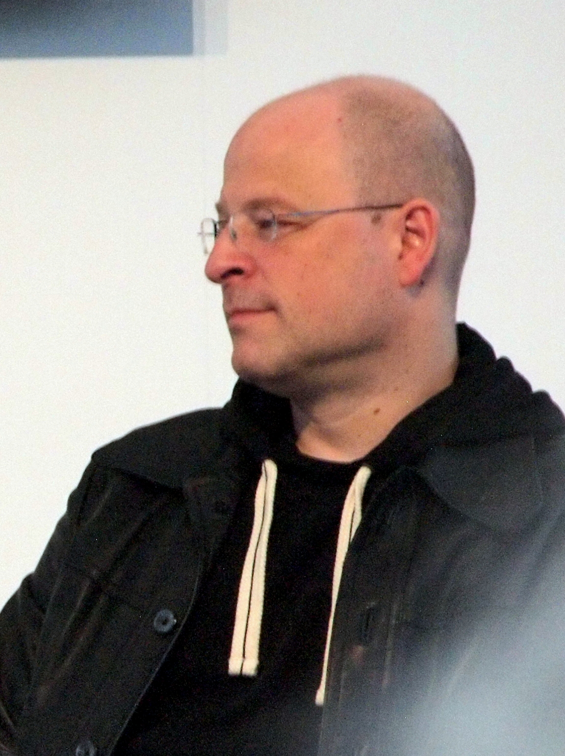 Thomas Finn auf der Frankfurter Buchmesse 2014